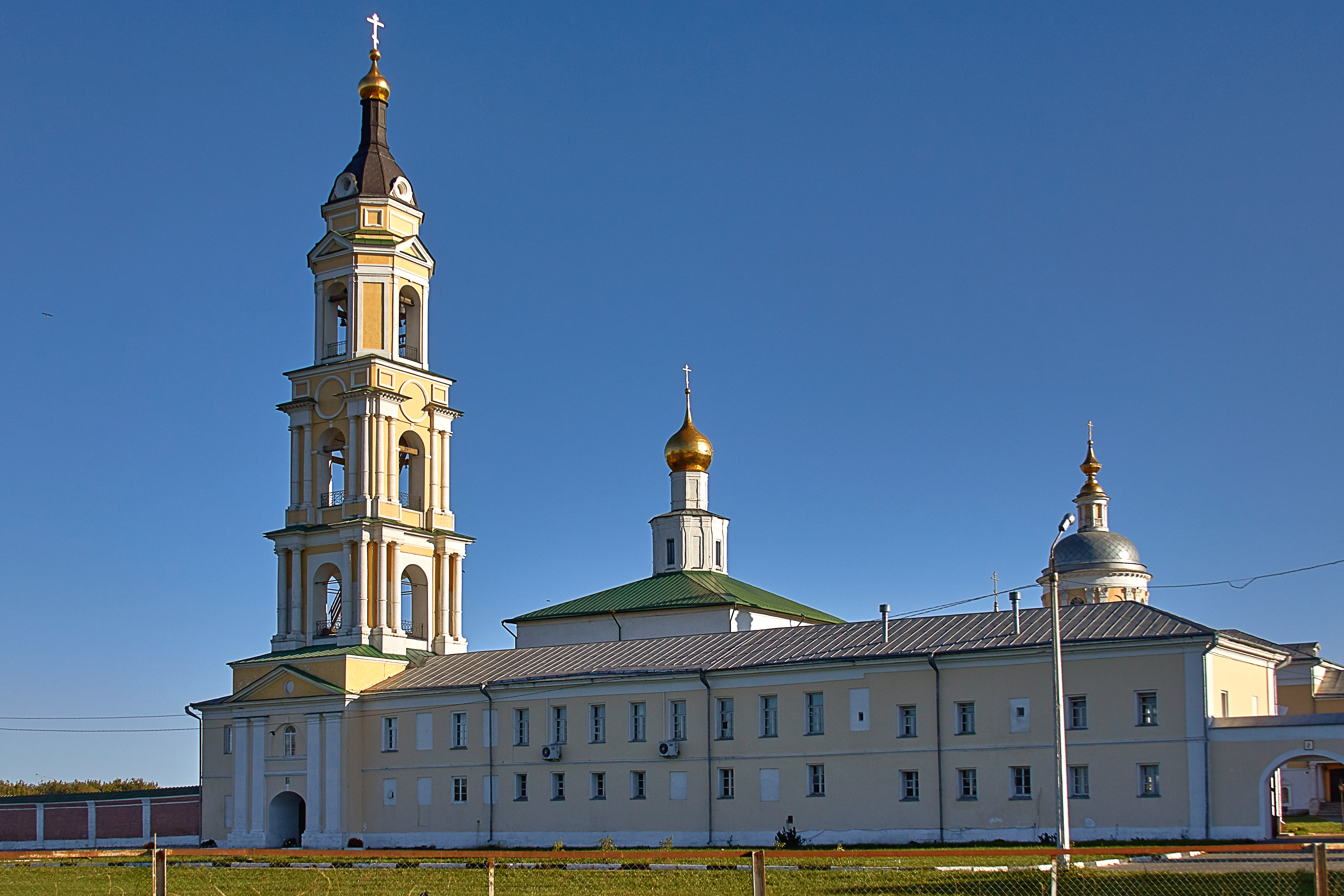 Корпус келейный восточный: улица Голутвинская, Коломна, Московская область